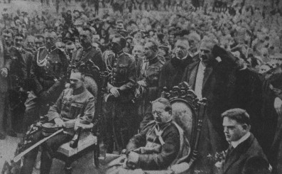 Oryginalny podpis pod zdjęciem: Historyczne zdjęcie z 15.VIII.1919 r. Siedzą od lewej: Marsz. Józef Piłsudski, Nuncjusz papieski Msgr. Ratti (obecny Papież Pius XI), Herbert Hoover (późn. Prezydent St. Zj. A. P.). stoją na pierwszym planie m. i. gen. dyw. K. Sosnkowski, gen. Leśniewski, J. Ign. Paderewski.